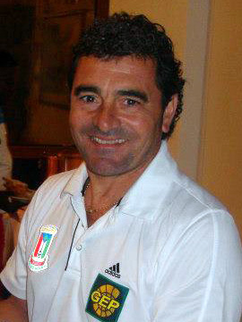 Esteban Becker Churikian. (Nació el 31 de Agosto de 1964 en Bernal, Provincia de Buenos Aires, Argentina).